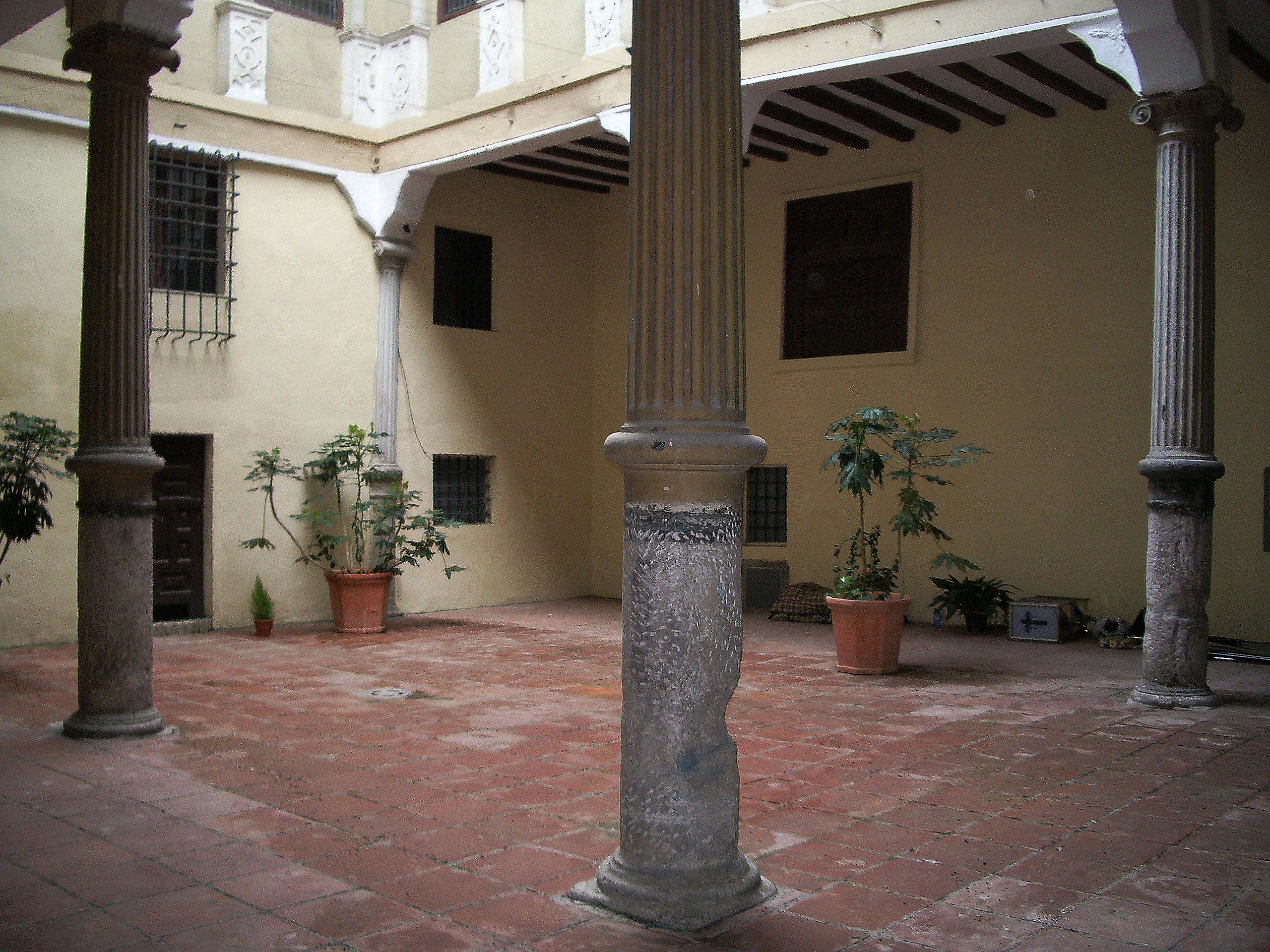 Patio interior de la casa de Miguel Donlope (Zaragoza)